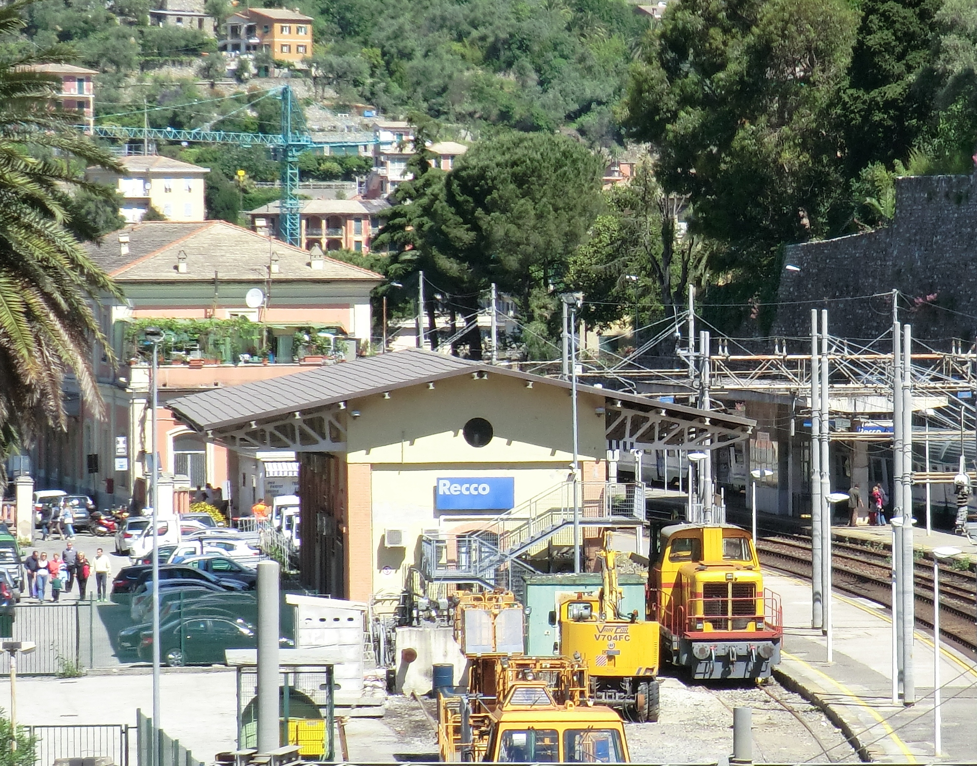 Stazione di Recco, il magazzino merci.